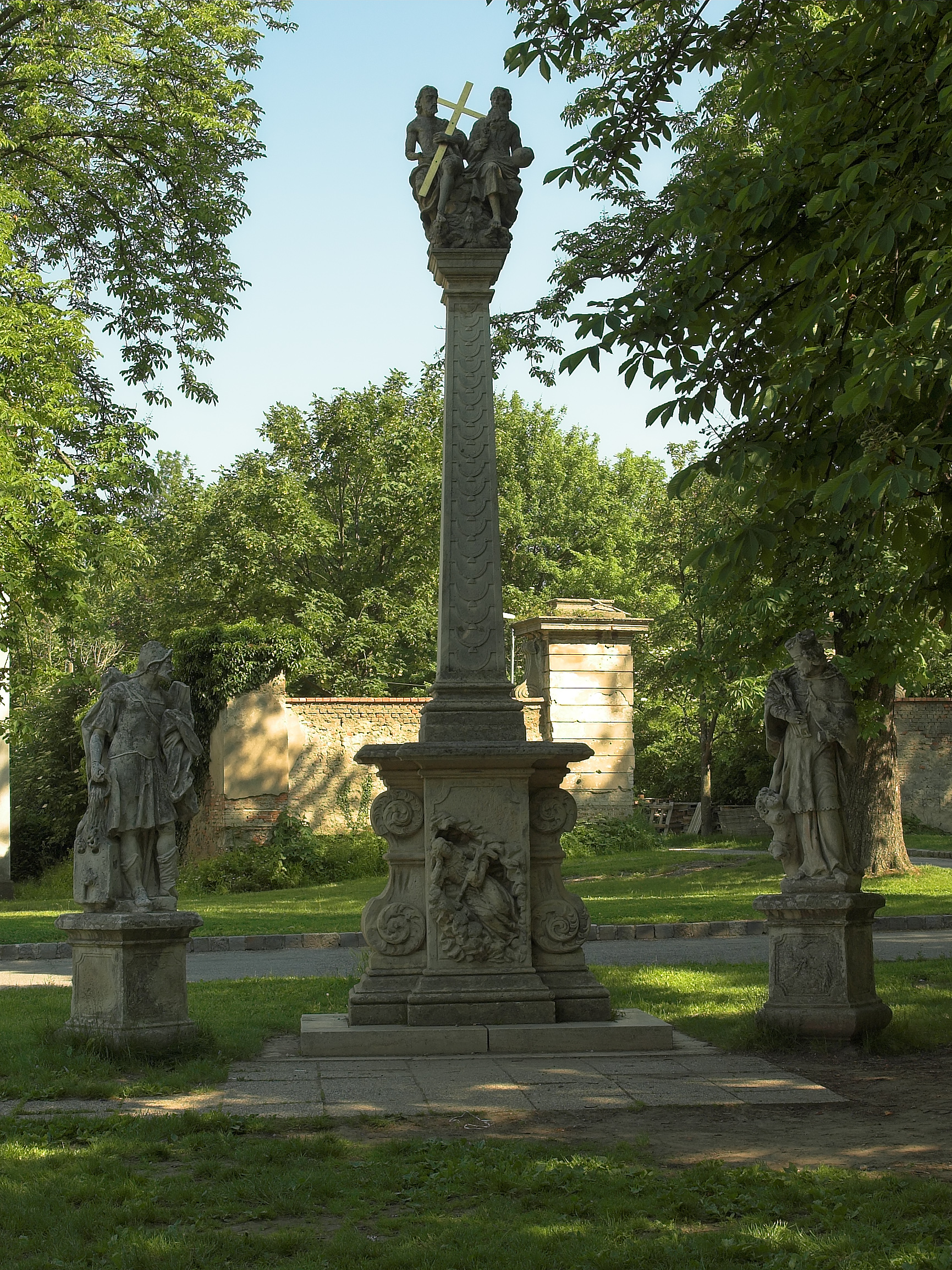 Kottingbrunn - Dreifaltigkeitssäule (Trinity Pillar)